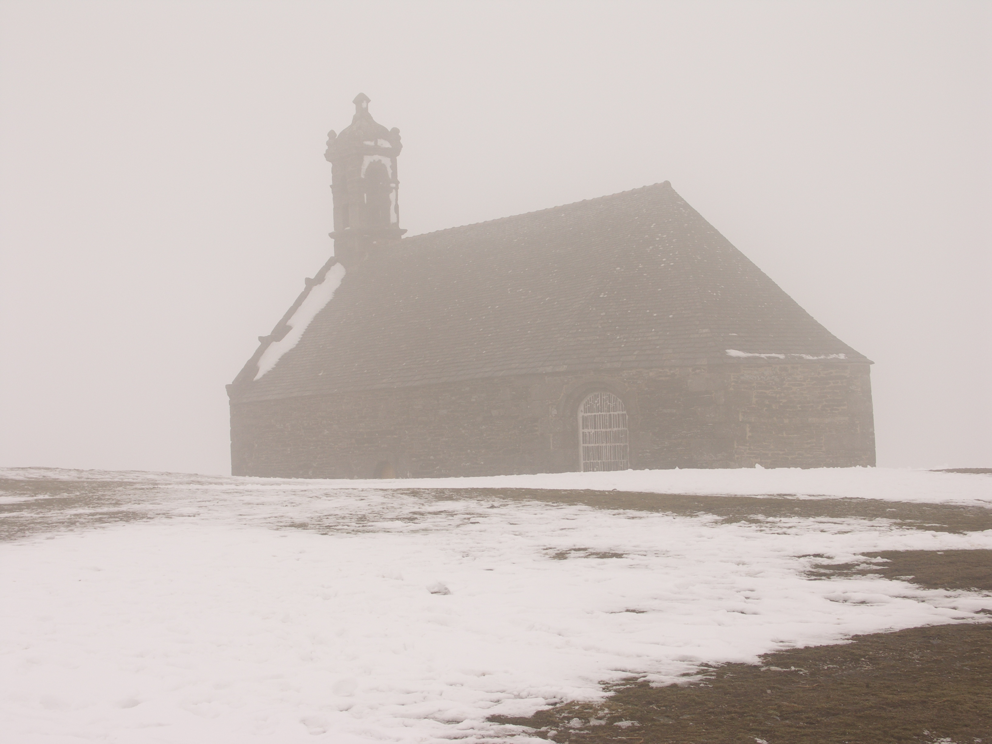 Saint-Rivoal (Finistère, Bretagne, France) : Le sommet du mont Saint-Michel de Brasparts est souvent perdu dans le brouillard.